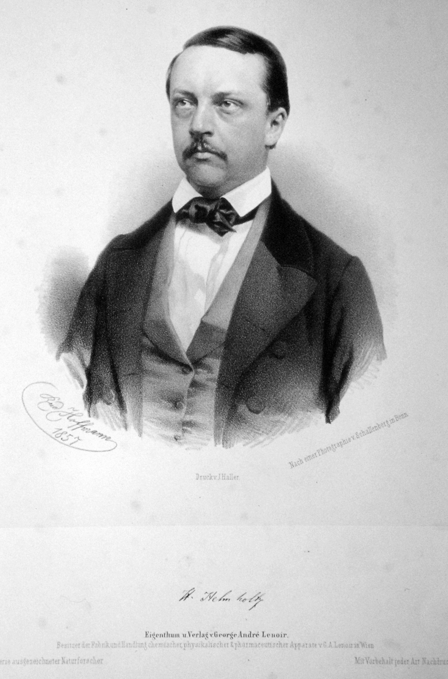 Hermann von Helmholtz (1821-1894), deutscher Physiker und Physiologe. Lithographie von Rudolf Hoffmann, 1857. Nach einer Fotografie von Schallenberg, Bonn